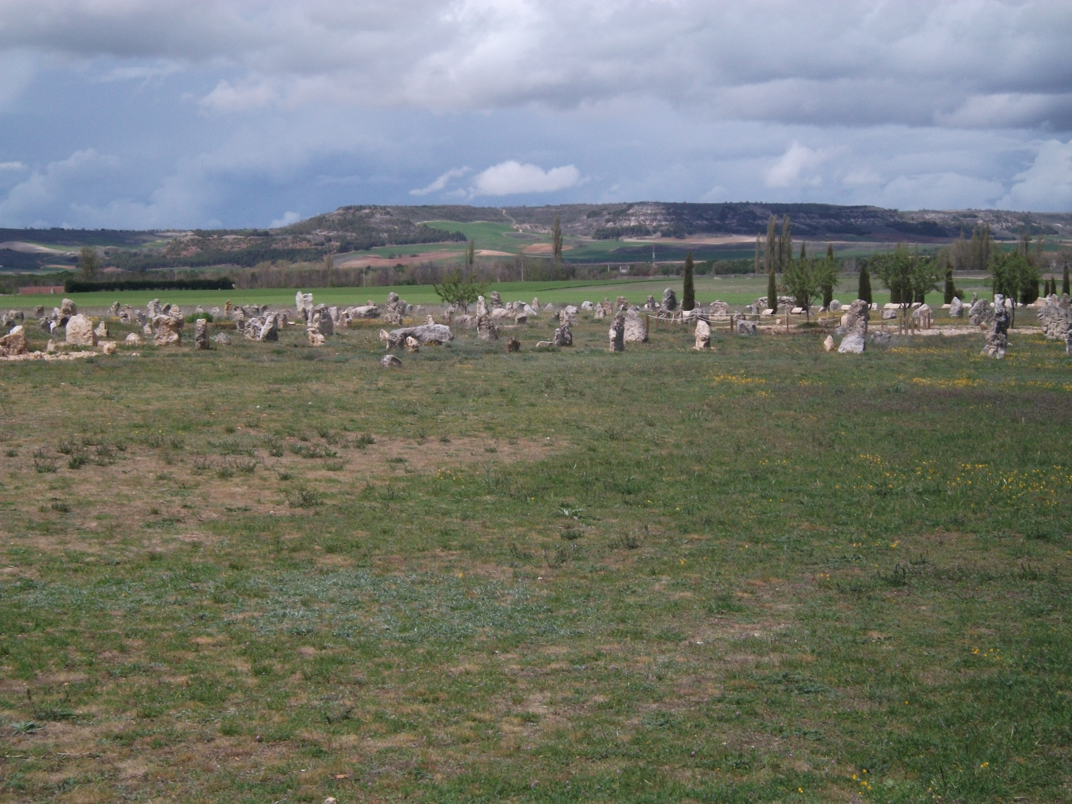 El cementerio de la Pintia vacceo-romana, la necrópolis de Las Ruedas.